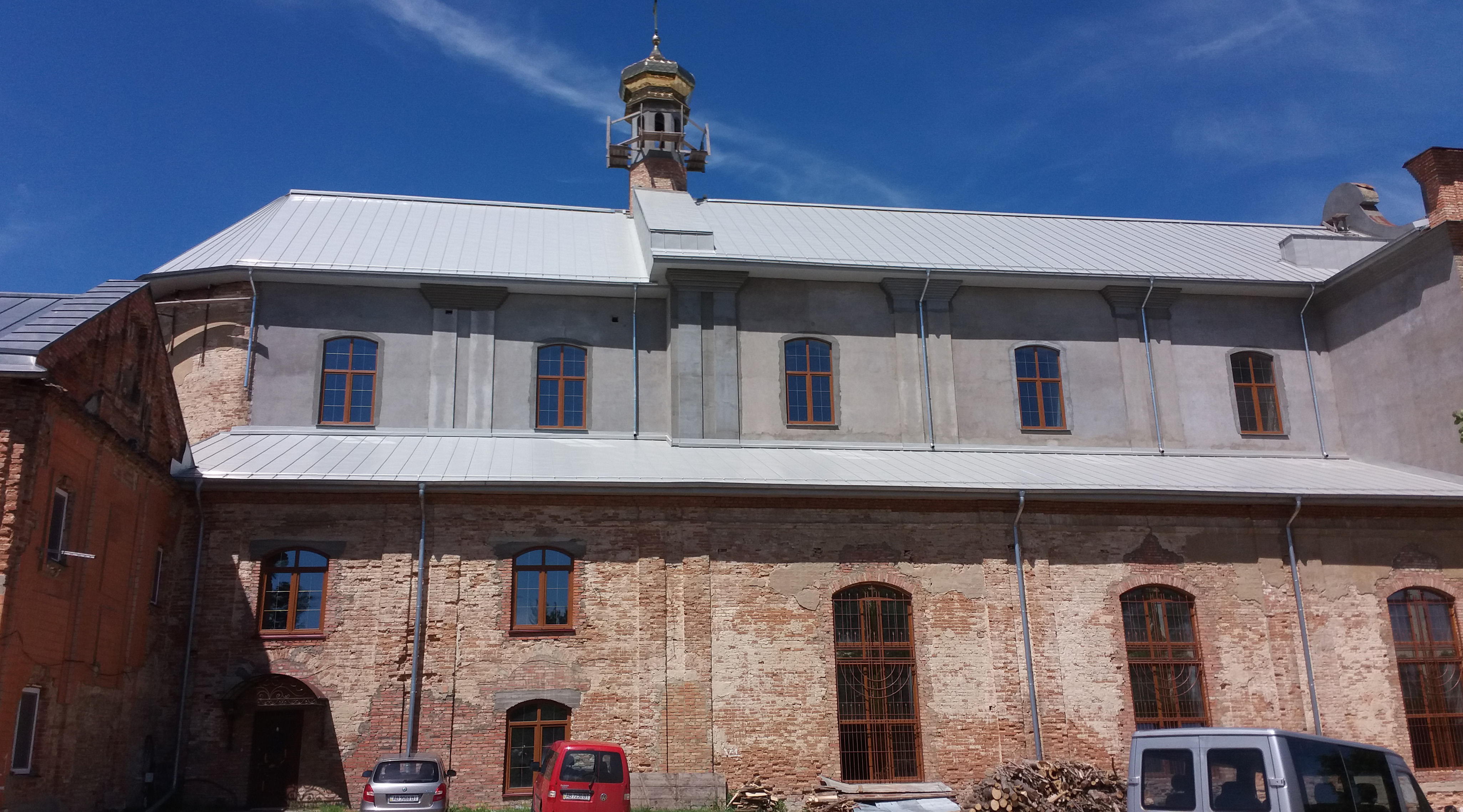 Костел Архангела Михаїла у Тиврові, Вінницька область, Україна